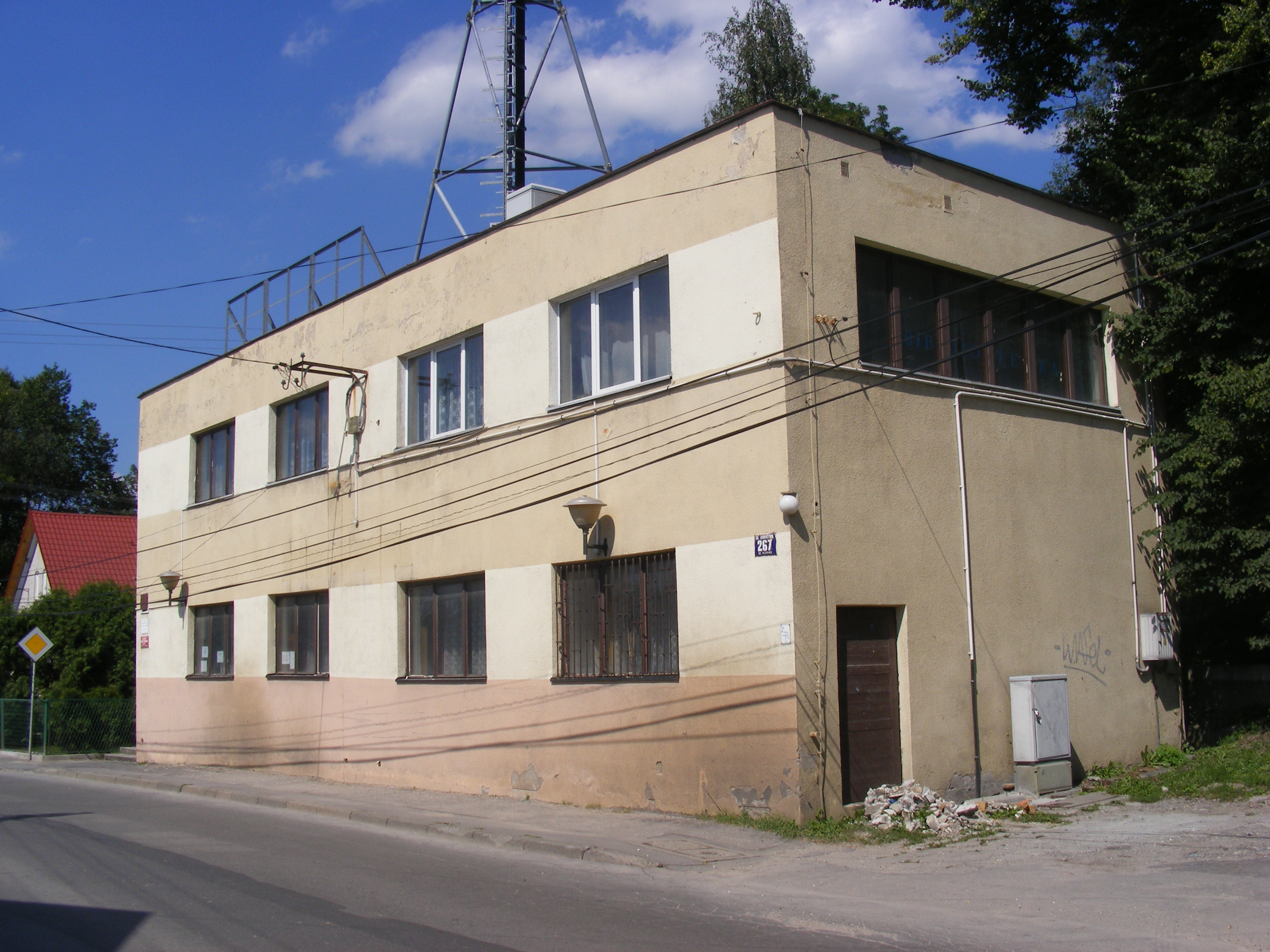 Katolicki dom kultury w Toniach